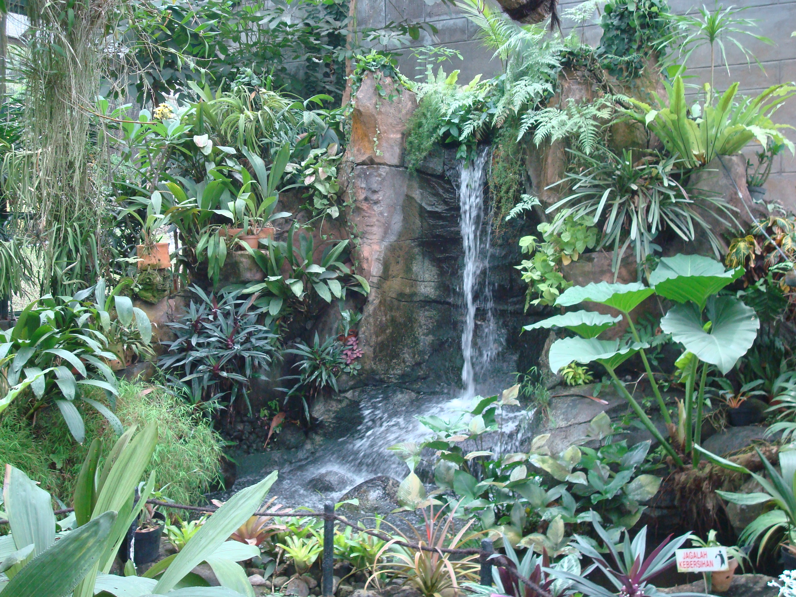 Im Botanischen Garten von Bogor